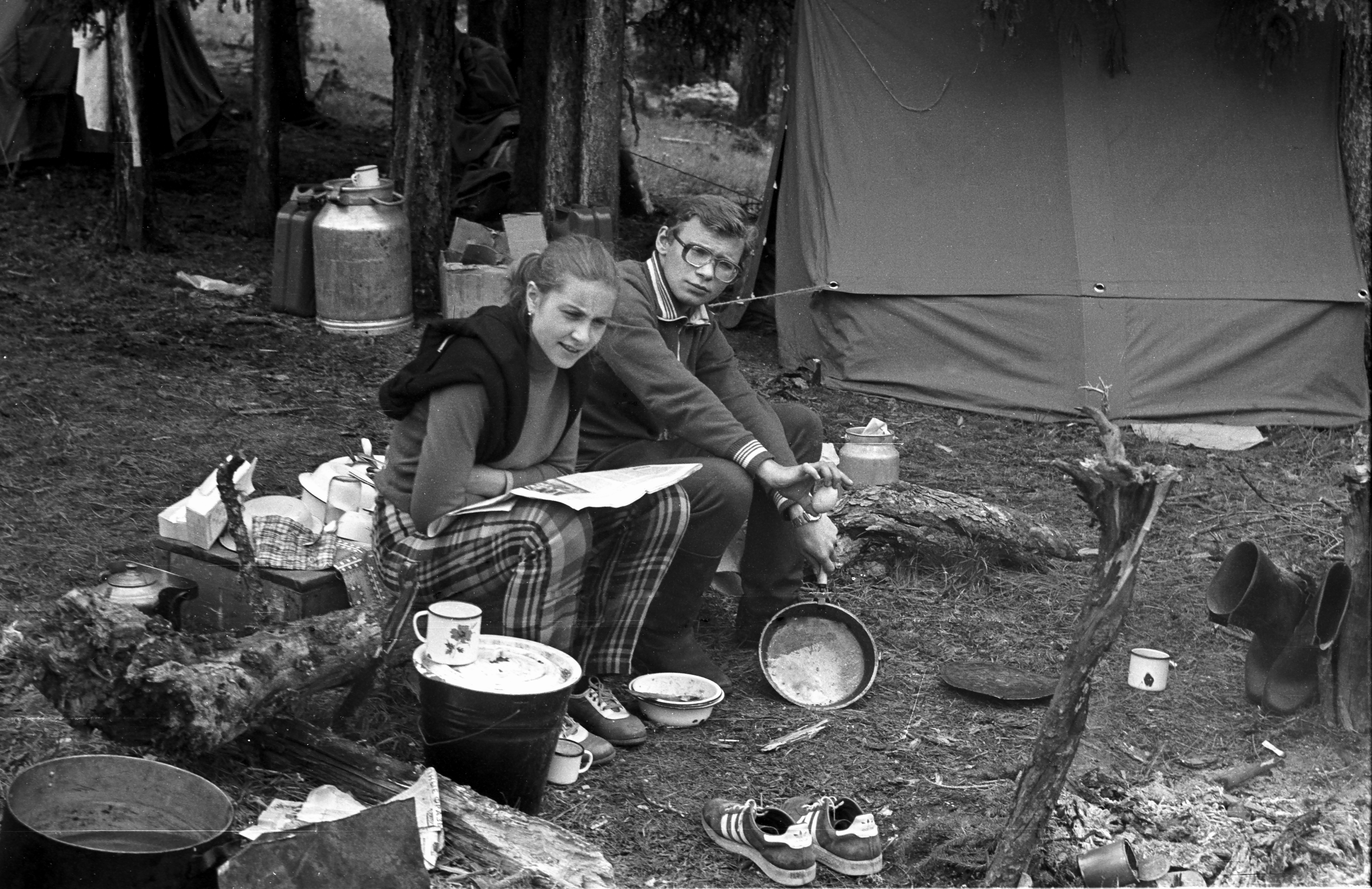 Студенты Нюра Полянская и Андрей Пузаченко с яйцом из брошенного гнезда дикой утки. Тува